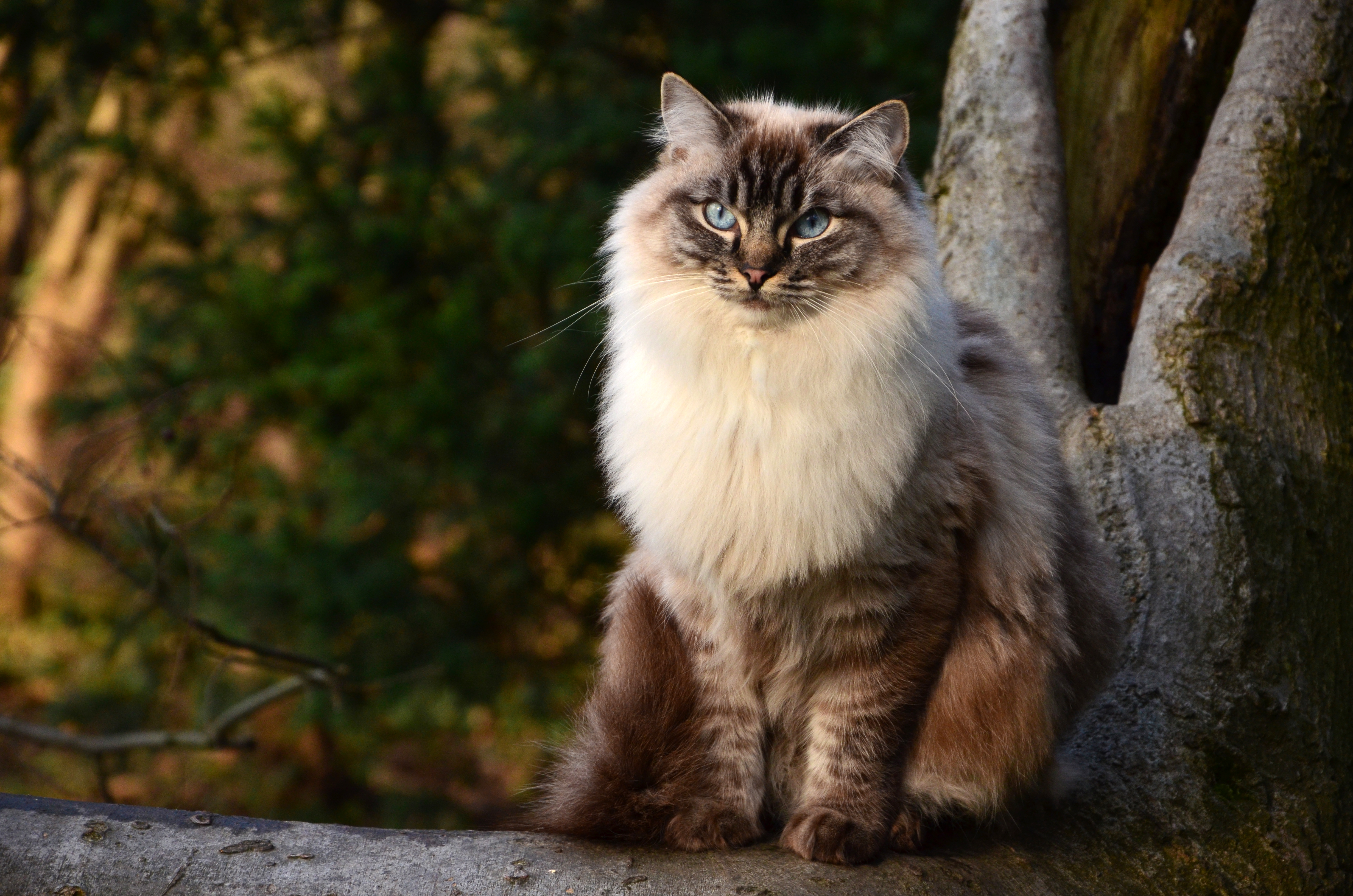 GIC Uljanka Koty Agaty*PL, z hodowli LoveLorien*PL. Ragdoll n 21 - seal lynx - czarny pręgowany.